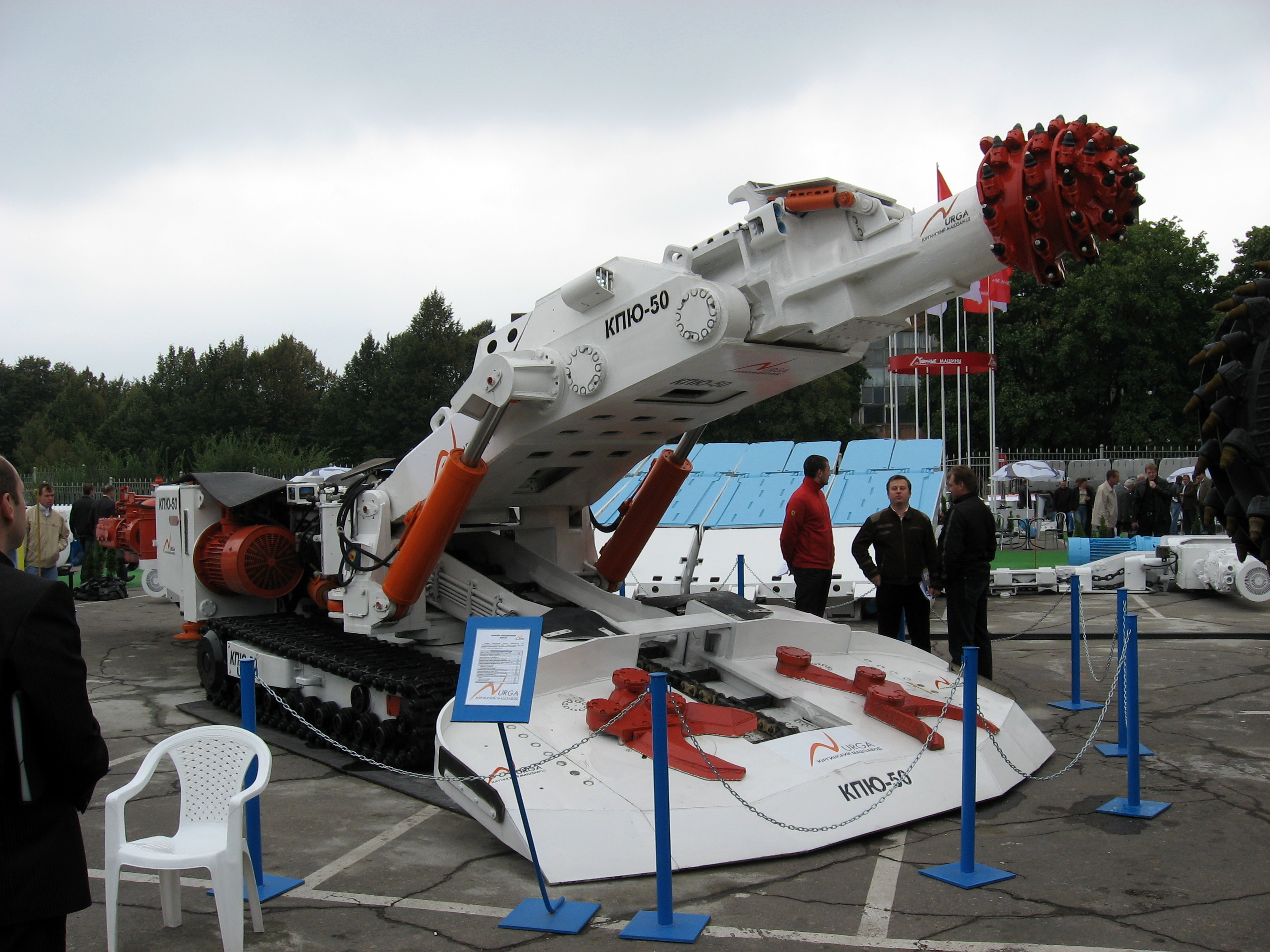 Фото з виставки Вугілля-Майнінг 2010